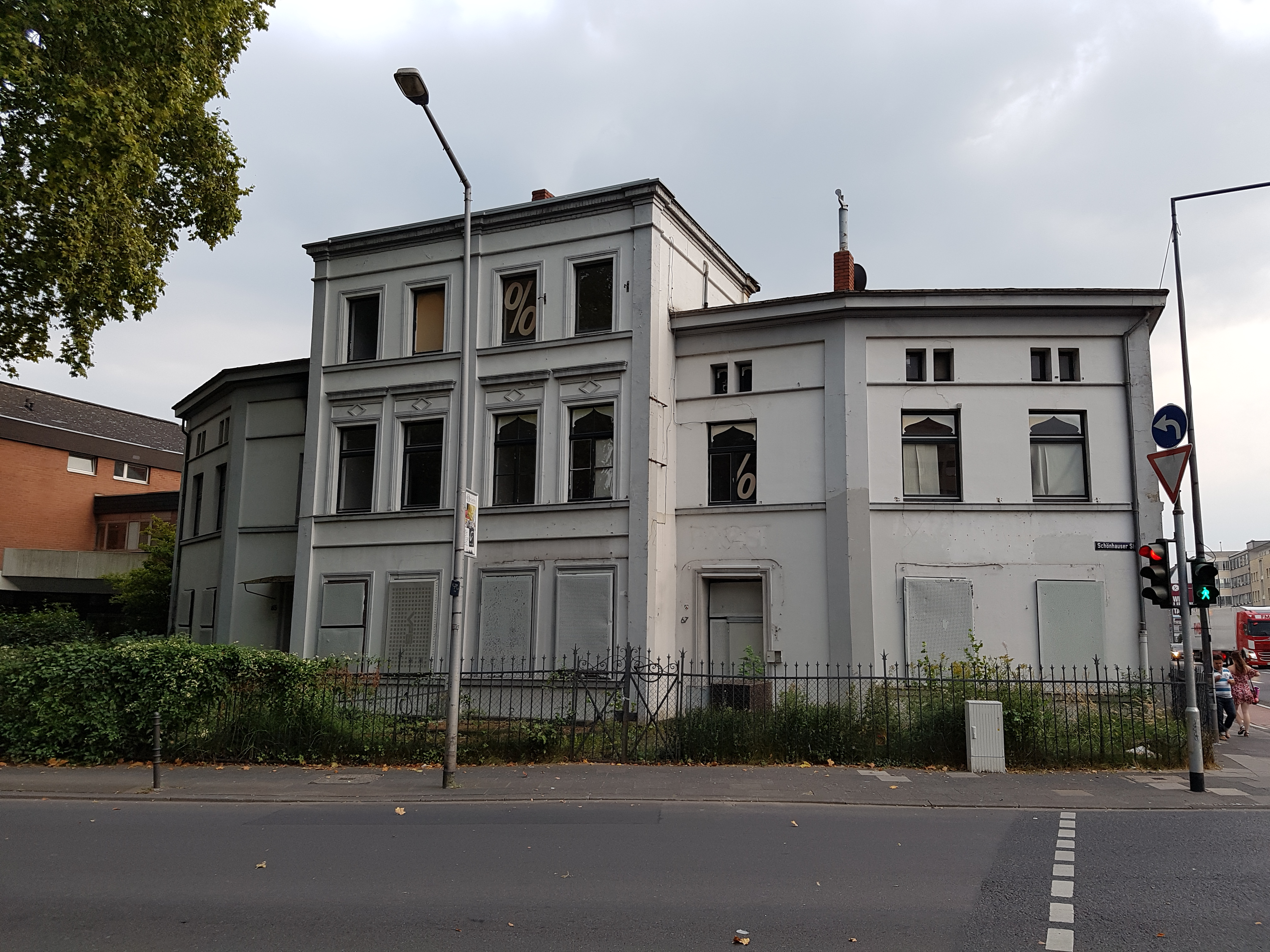 Denkmalgeschützte Villa Lenders, Schönhauser Straße 65 und 67 This is a photograph of an architectural monument. This is a photograph of an architectural monument.